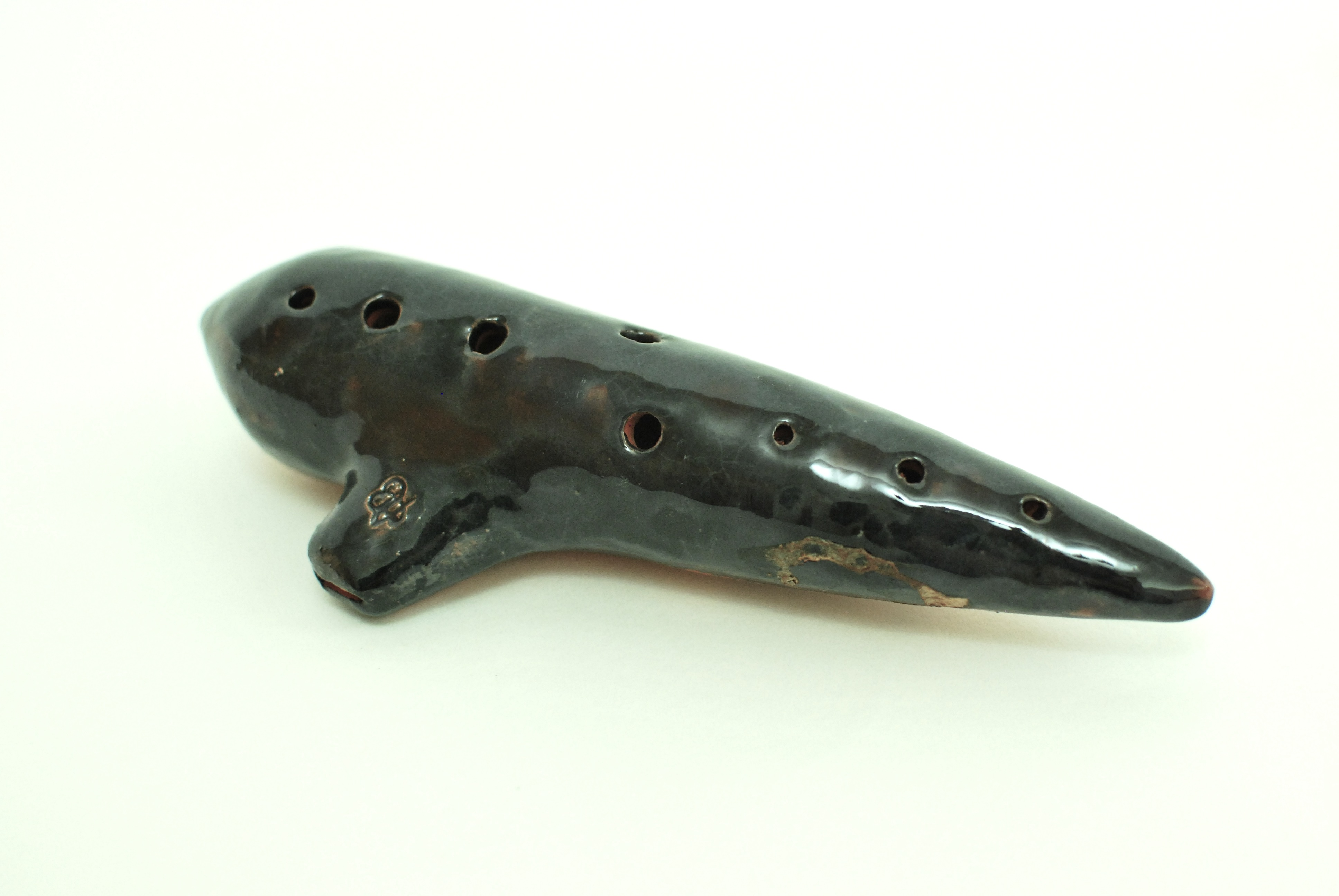 Ocarina, author reported. ca. 1900. Museu de la Música de Barcelona.(MDMB 1447)